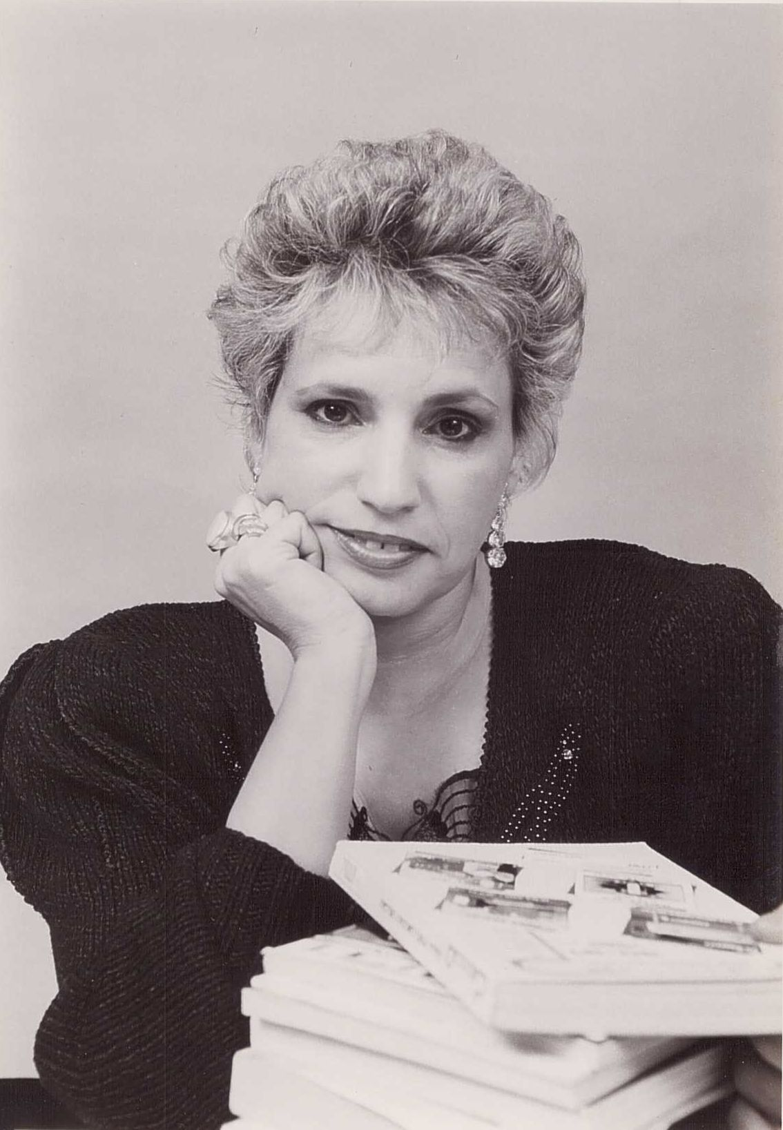 פרופסור שפרה ברוכסון-ארביב